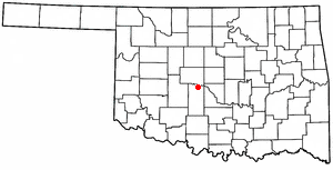 fffffffffffff